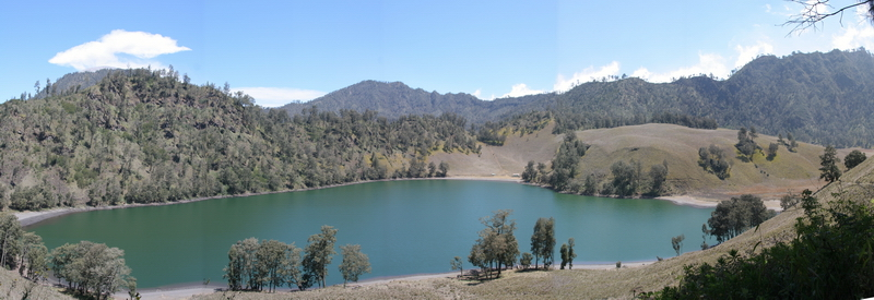 Lake Ranu Kumbolo, East Java, Indonesia